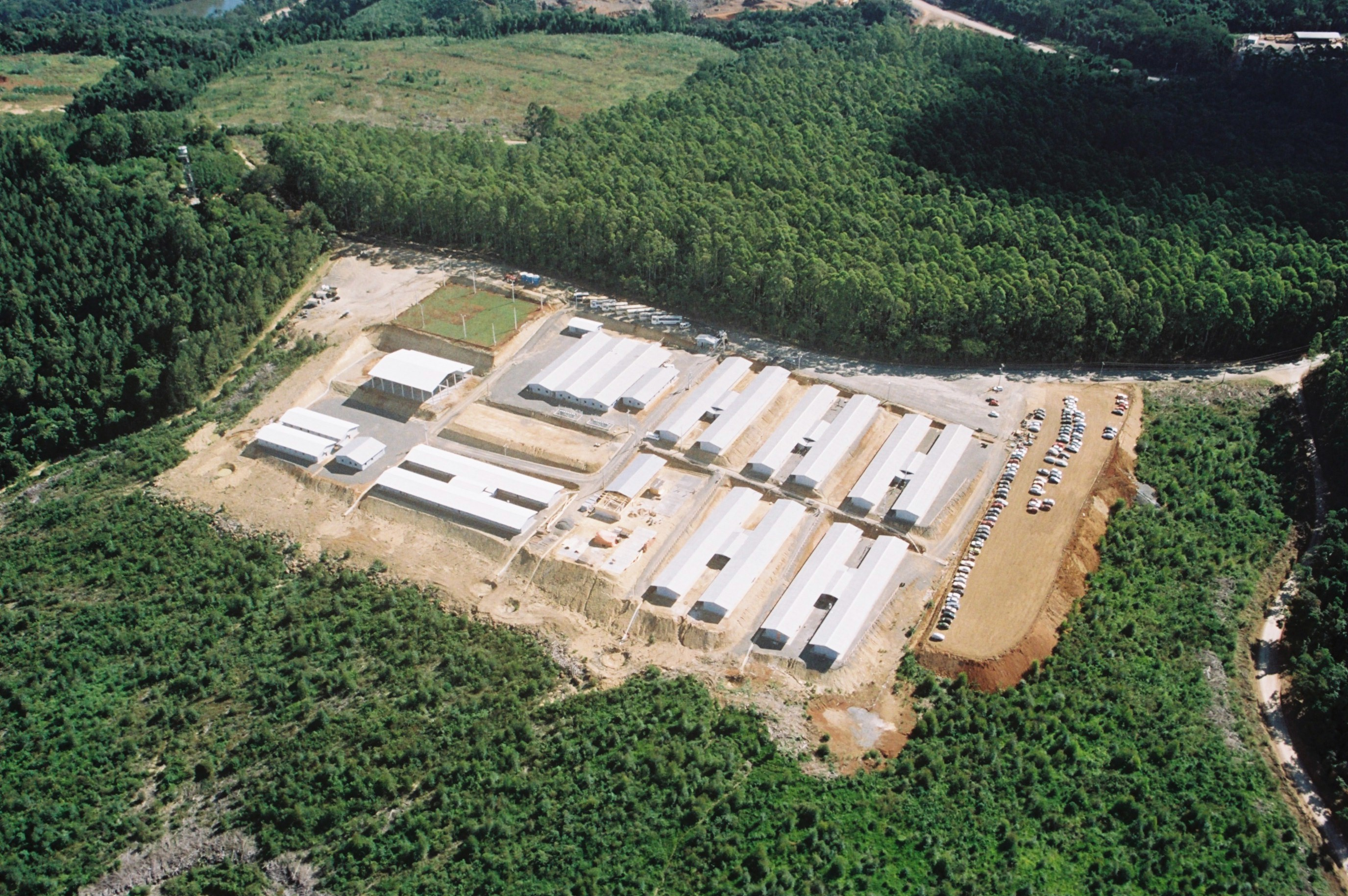 Alojamentos Usina Mauá (Eletrosul/Copel)